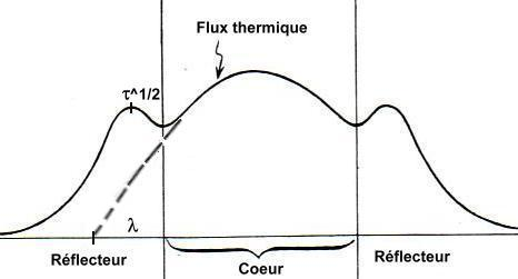 Forme du flux thermique dans le cœur et le réflecteur